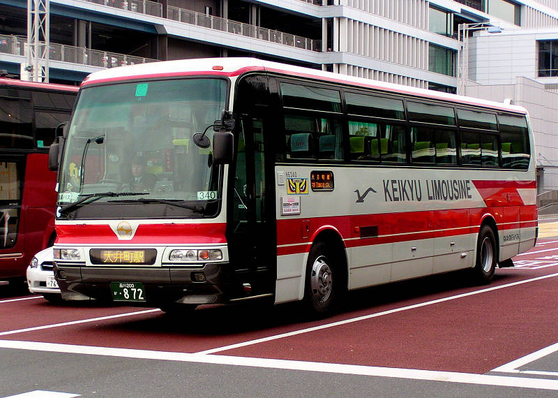 三菱ふそう・エアロバス KL-MS86MP 京浜急行バス 羽田営業所 H6340 羽田空港第2ターミナルにてMitsubishi Fuso Aero bus/ kehinkyukou bus / in haneda airport, Tokyo